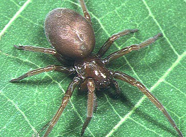 female Pandava laminata from Okinawa.